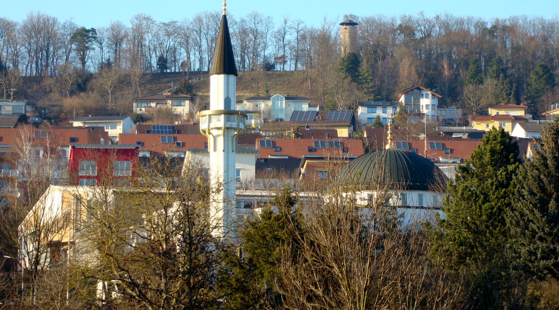 Enzauenpark mit Blick zur Moschee und zum alten Wasserturm in Pforzheim